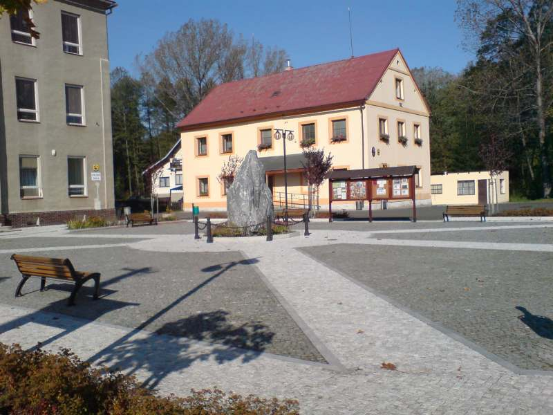 Písečná u Jeseníku obecní úřad